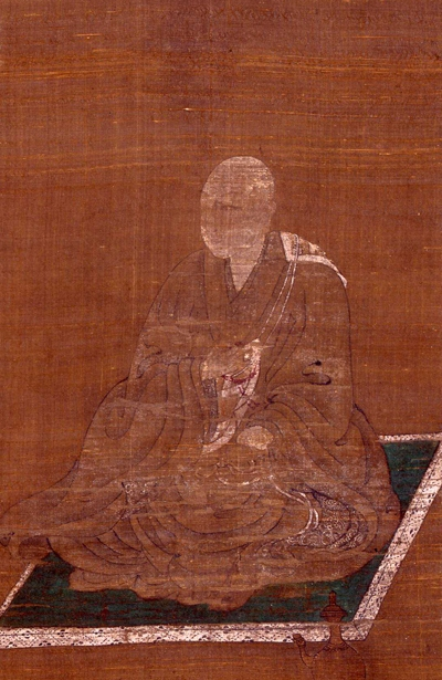 最上兼頼像（光明寺）